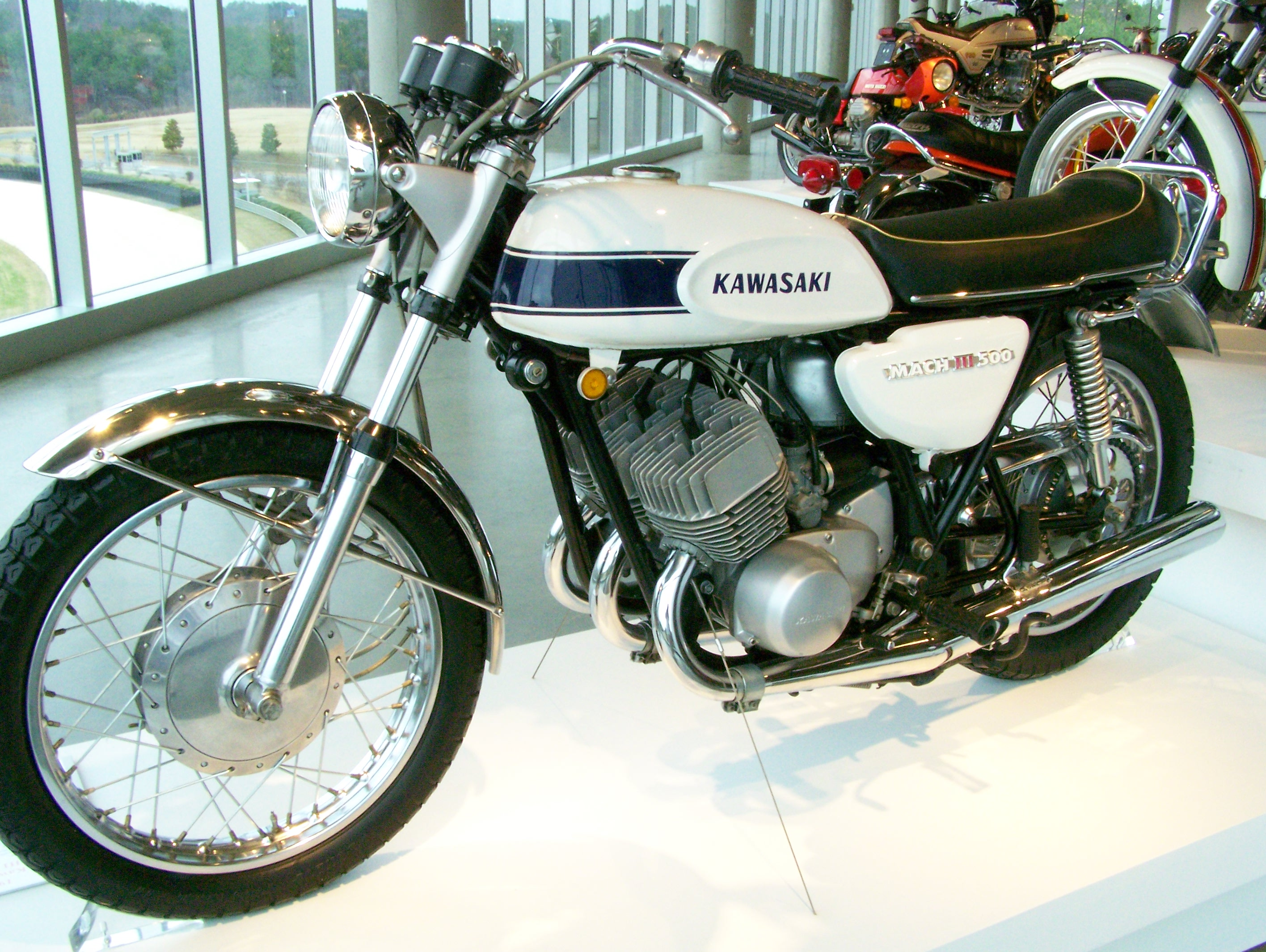 Barber Vintage Museum_98 Kawasaki 500 H1